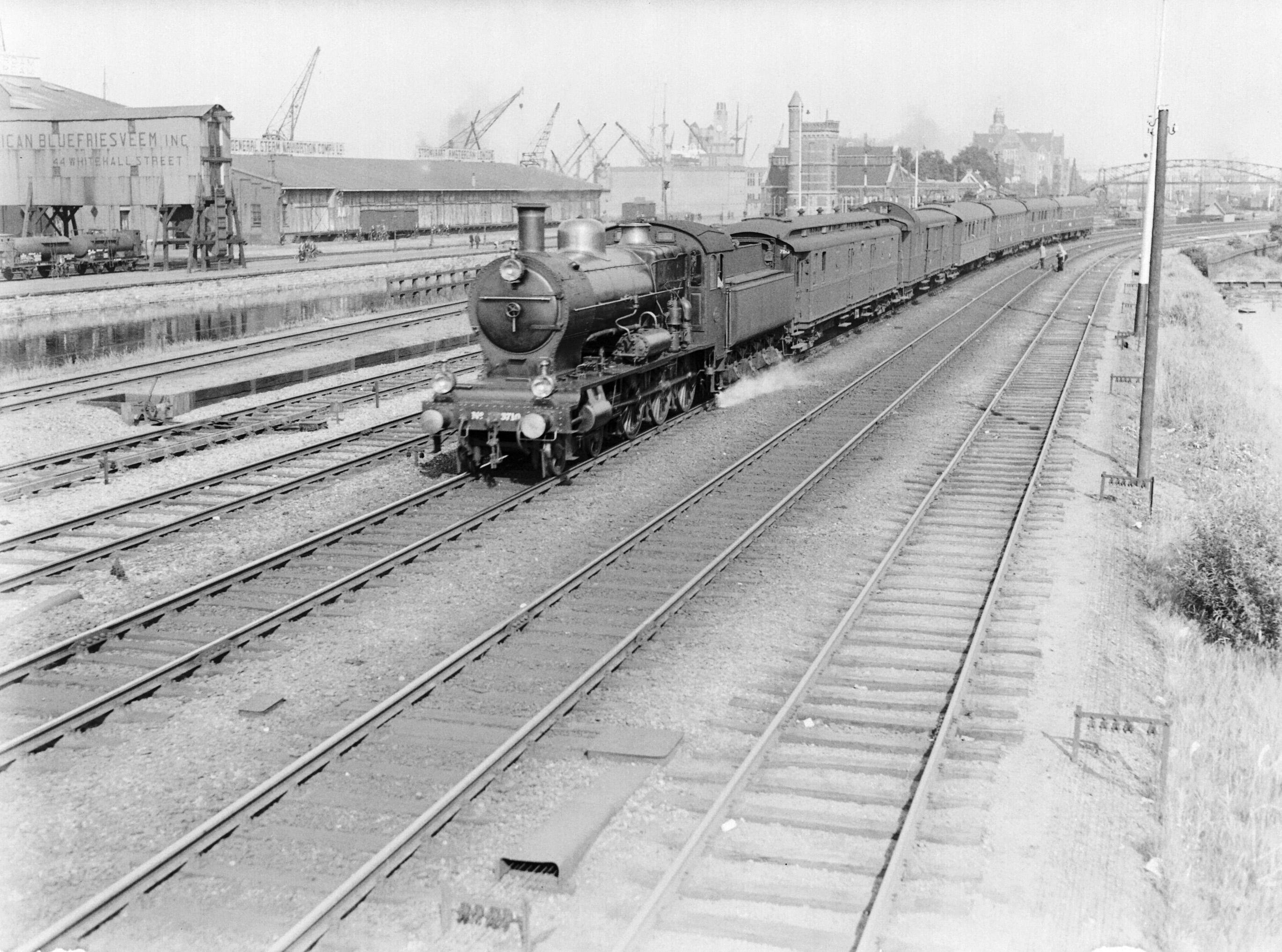 Collectie / Archief : Fotocollectie Van de Poll Reportage / Serie : Reportage Nederlandse Spoorwegen Beschrijving : Locomotief met wagons op het Centraal Station in Amsterdam Datum : 1933 Locatie : Amsterdam, Noord-Holland Trefwoorden : spoorwegen, stoomlocomotieven, wagons Instellingsnaam : NS Fotograaf : Poll, Willem van de, [onbekend] Auteursrechthebbende : Nationaal Archief Materiaalsoort : Glasnegatief Nummer archiefinventaris : bekijk toegang 2.24.14.02 Bestanddeelnummer : 189-0642